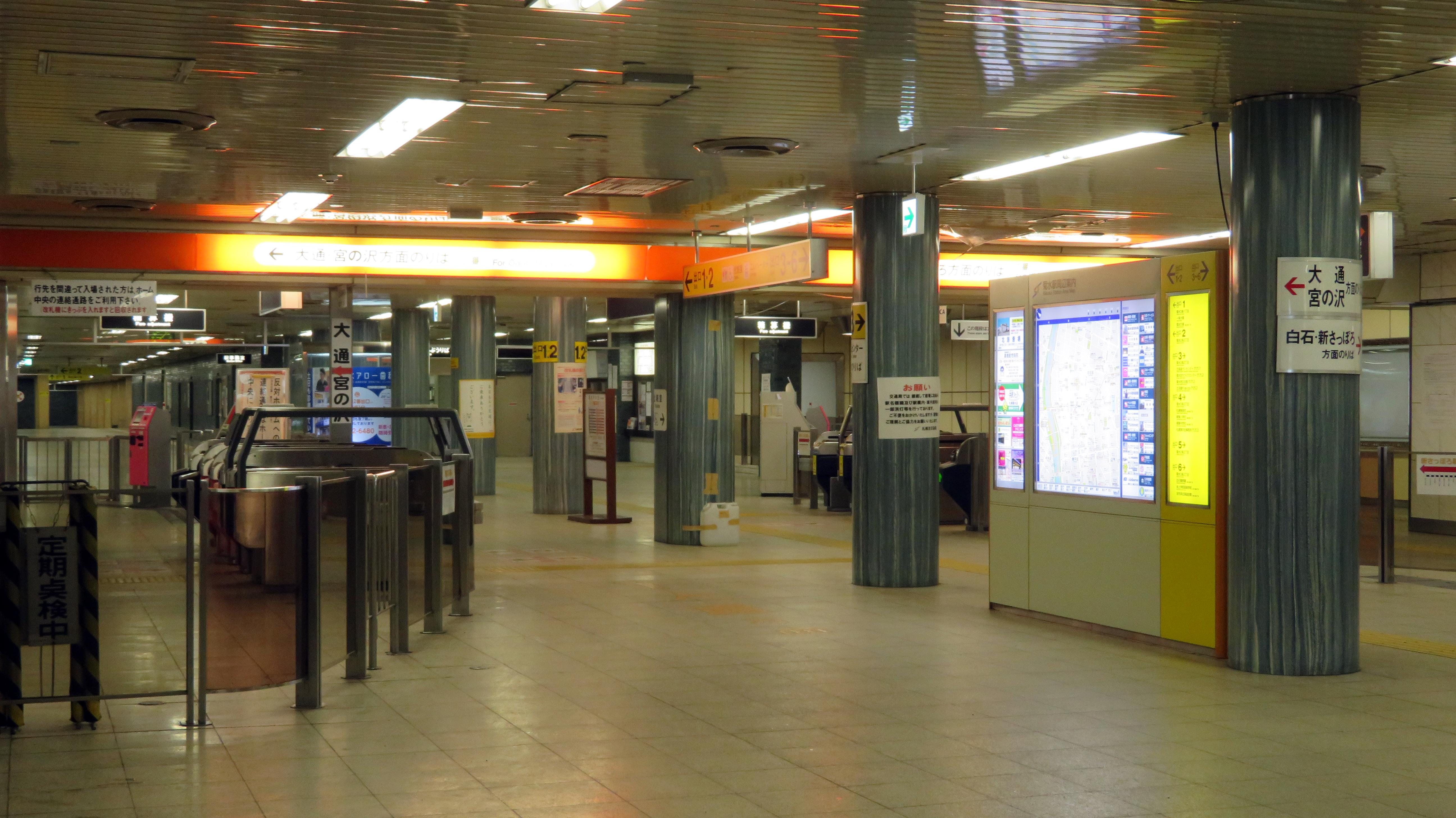 菊水駅改札口 Canon PowerShot SX720 HS